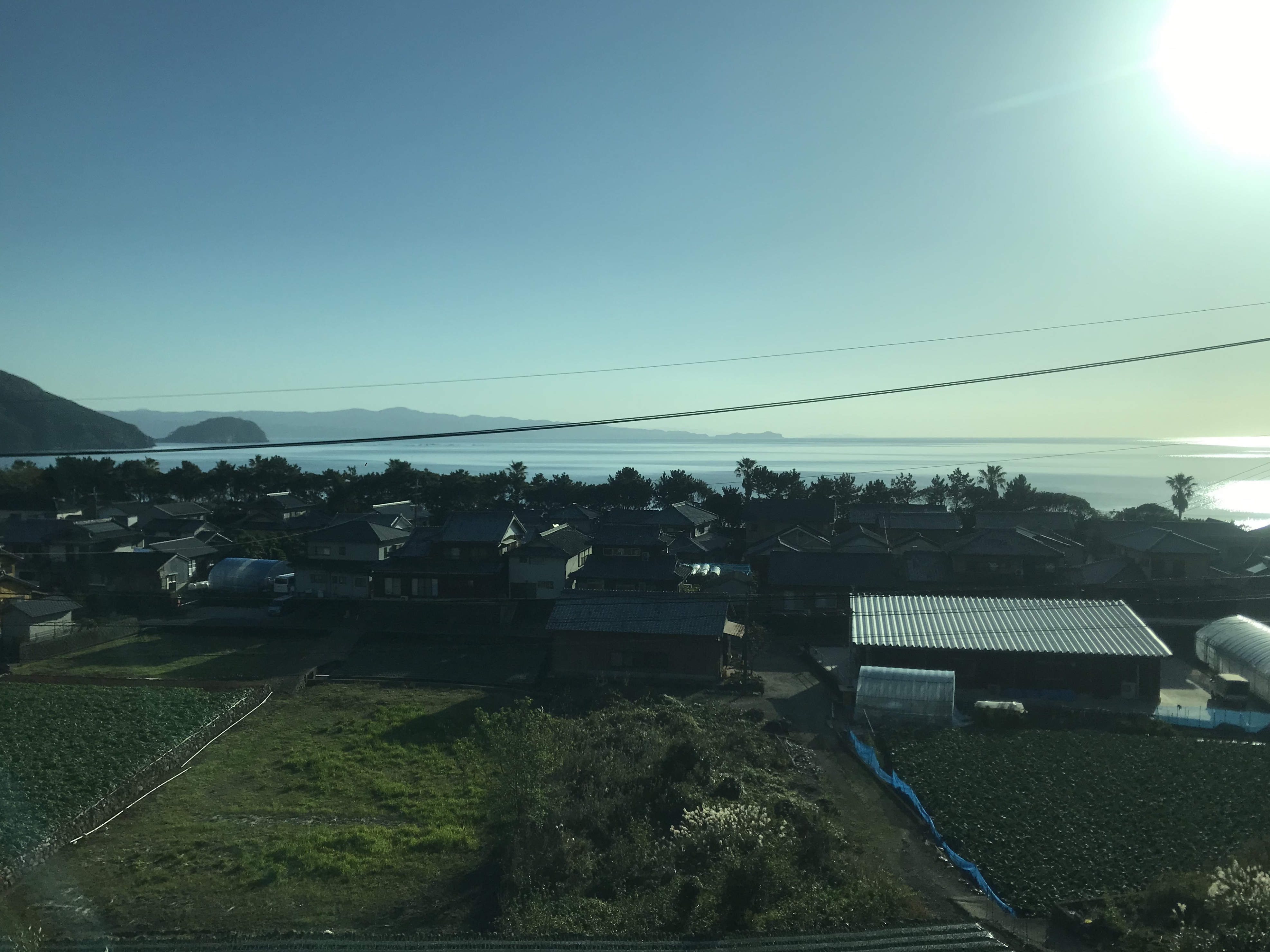 国道57号・251号のバス車内より望む橘湾